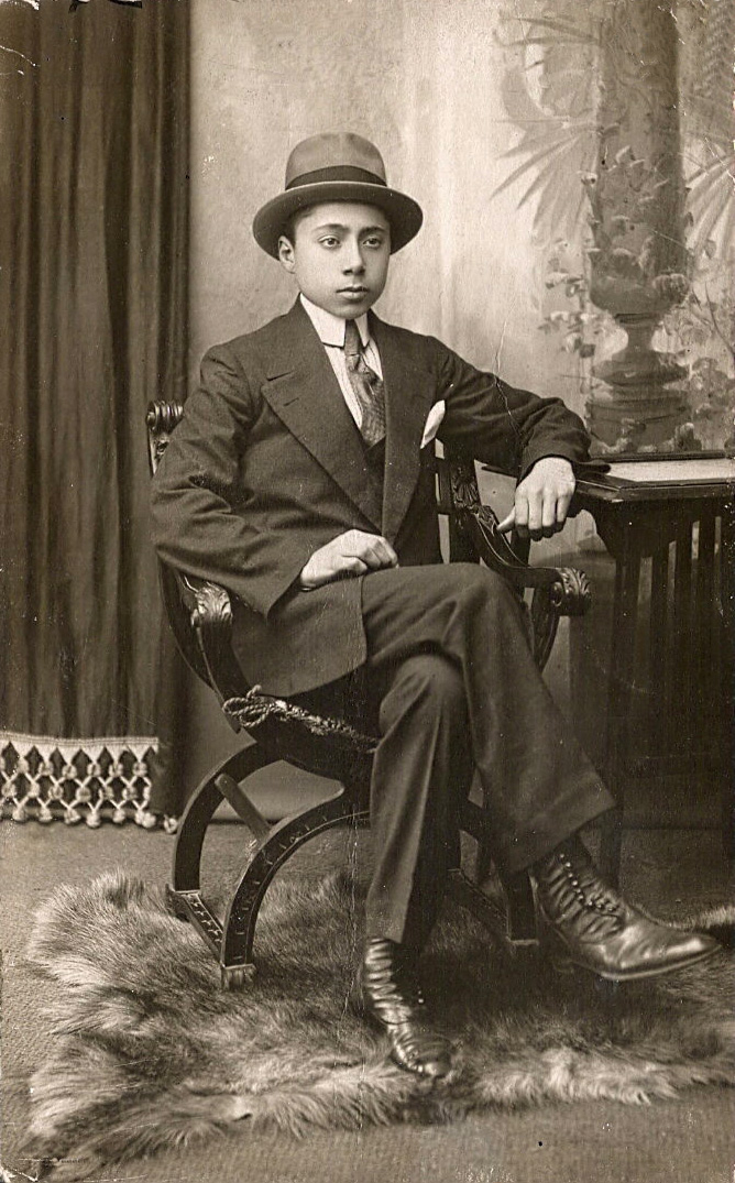 Guido Chiarelli, studente alla Regia Università di Palermo Guido Chiarelli as a student at the University of Palermo